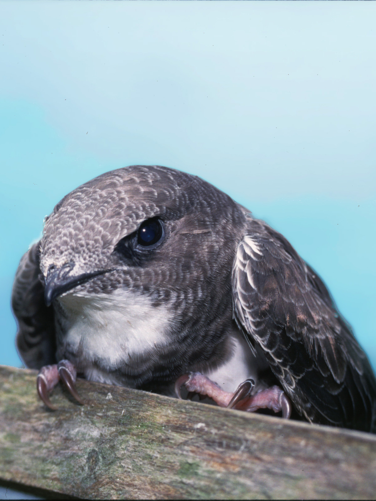 Alpine Swift (Tachymarptis melba)